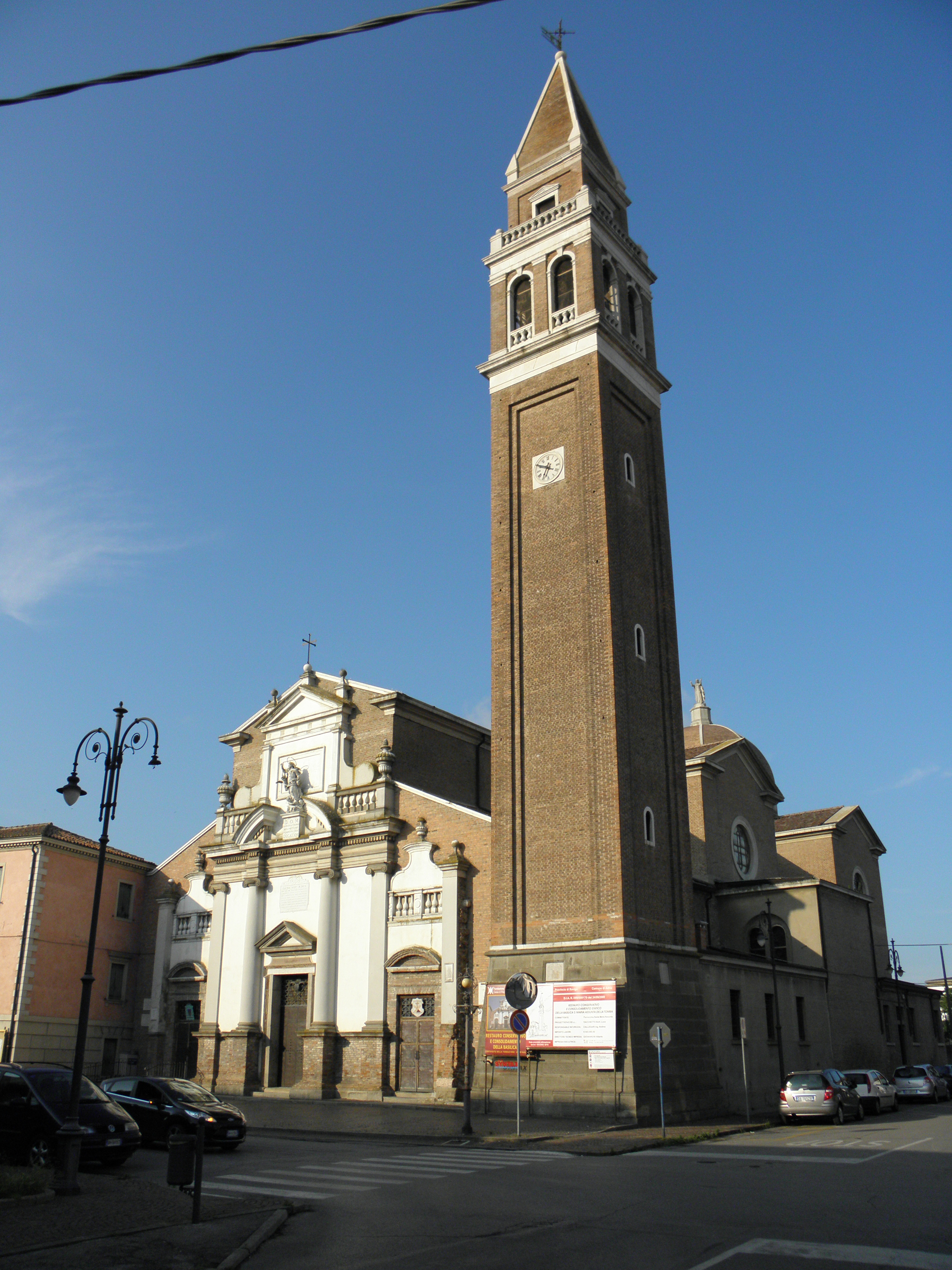 Adria: chiesa di Santa Maria Assunta detta "della Tomba".